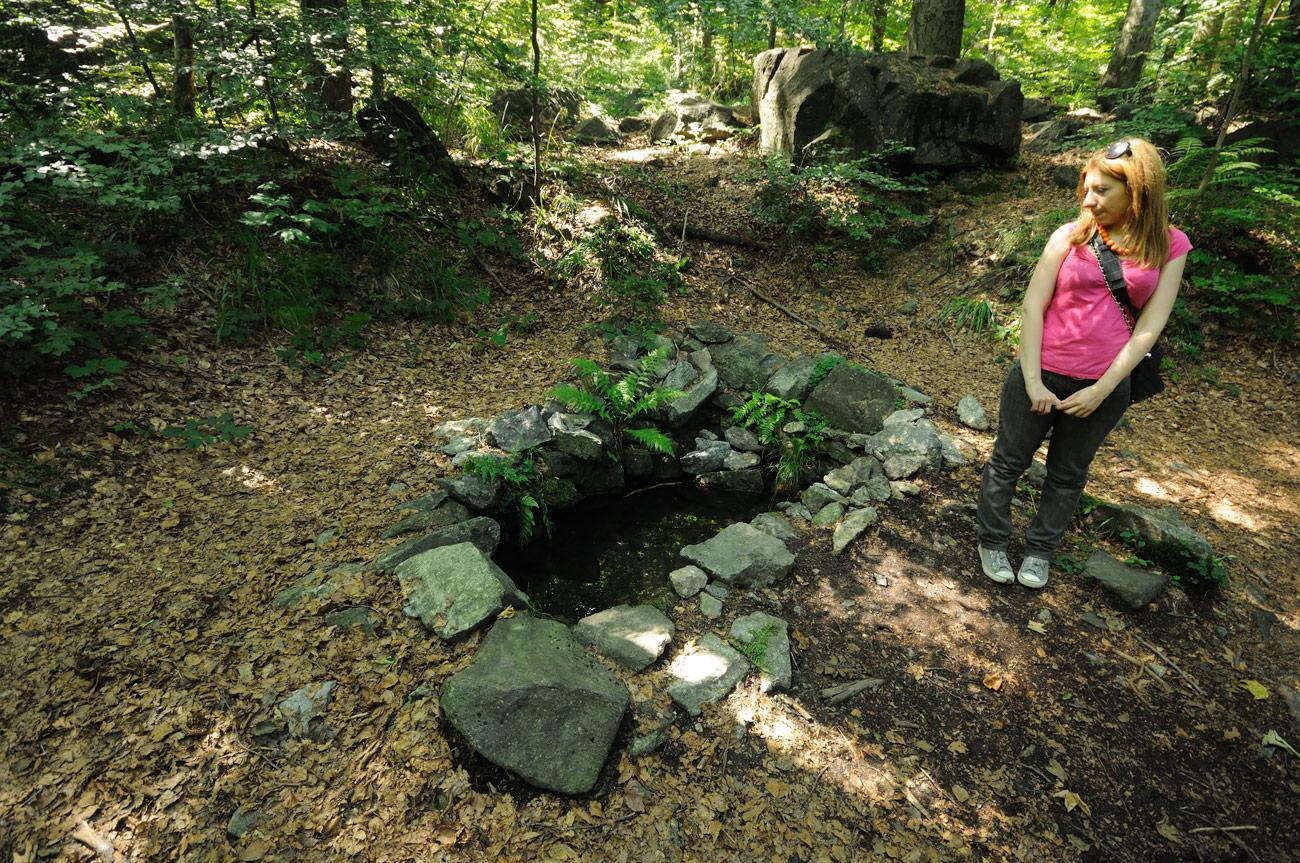 Święte źródełko znajdujące się na południowy-wschód od szczytu - przy czerwonym szlaku.